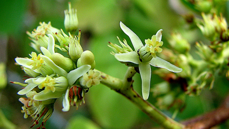 Sacoglottis mattogrossensis Malme